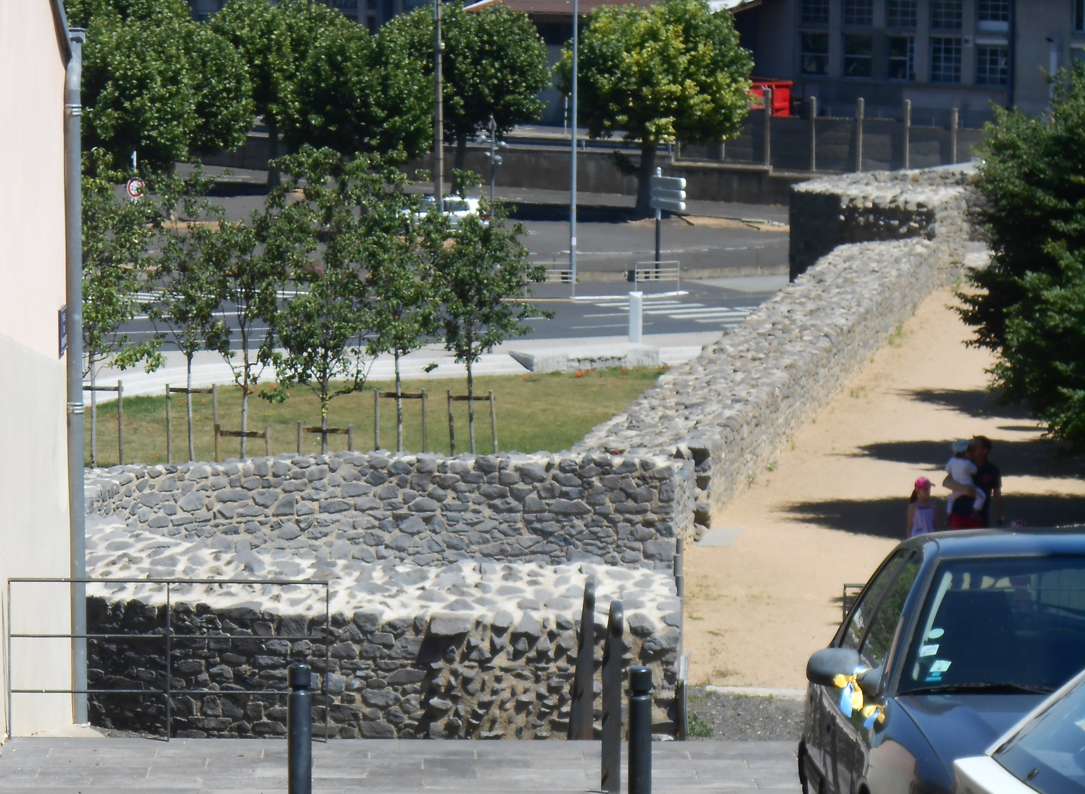 Partie supérieure des remparts de Montferrand, chemin de ronde, de Montferrand, Clermont-Ferrand, Auvergne.